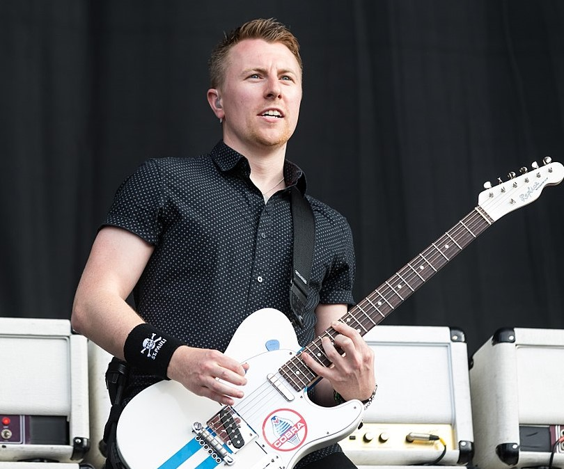 Status Quo during Wacken Open Air at Schleswig-Holstein, Wacken, , Germany on 2017-08-03, Photo: Sven Mandel